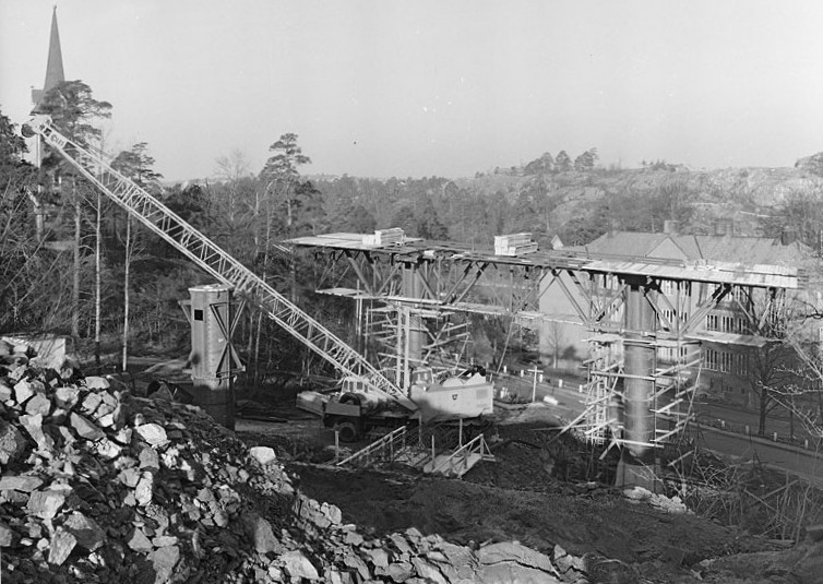 Blommensbergsviadukten, Essingeledens planering mot norr vid Blommensbergsskolan